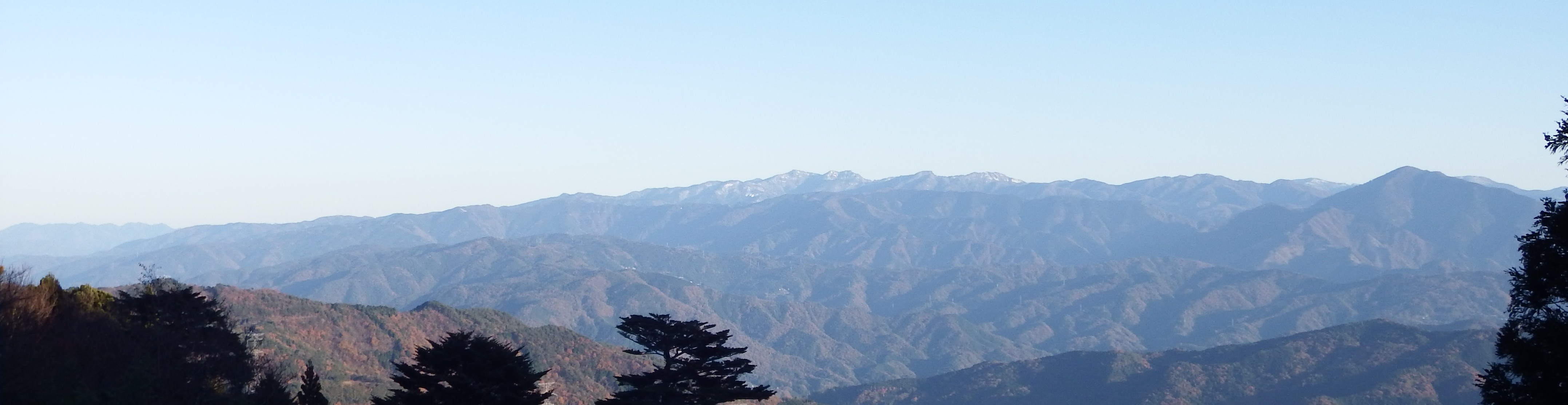 祖谷山の山々